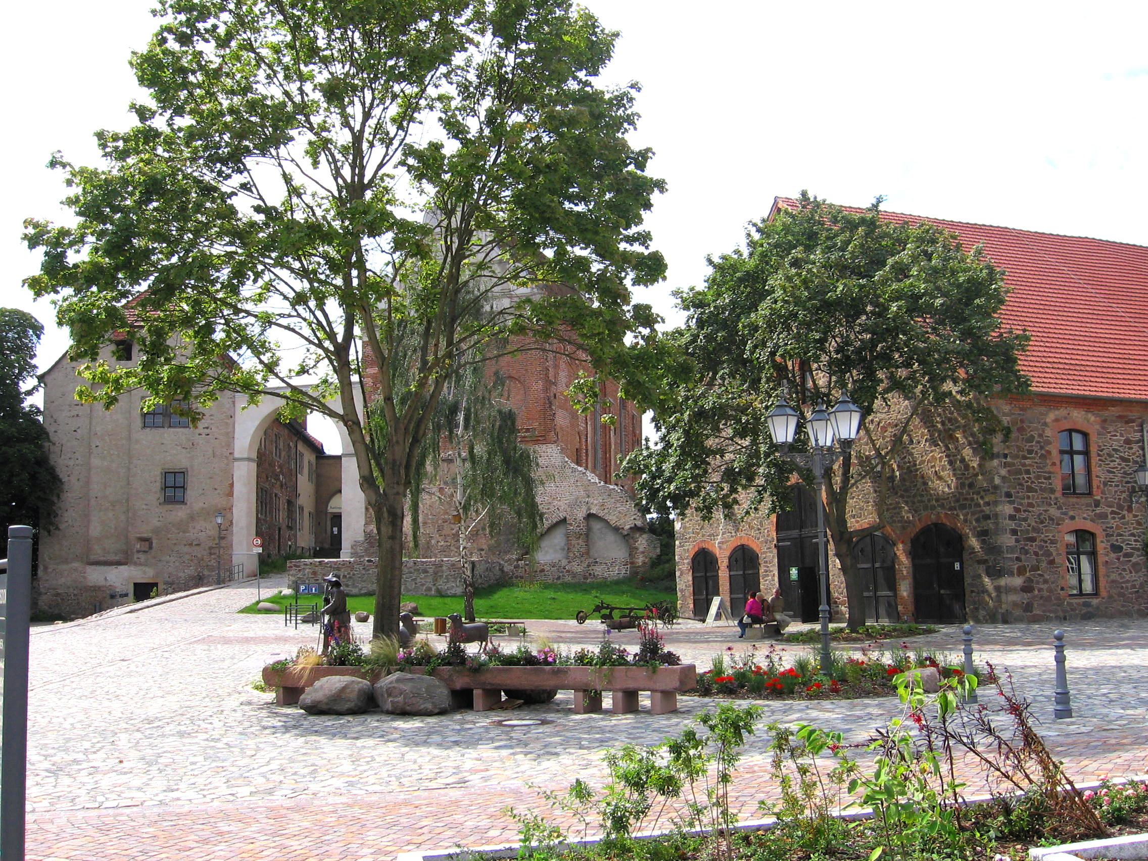 Schloßdomäne